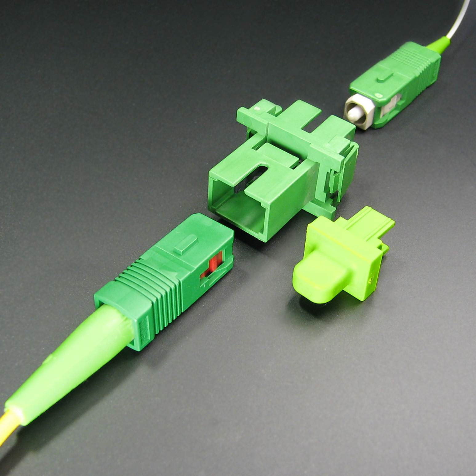 Волоконноптические соединители SC/APC с розеткой и заглушкой для розетки